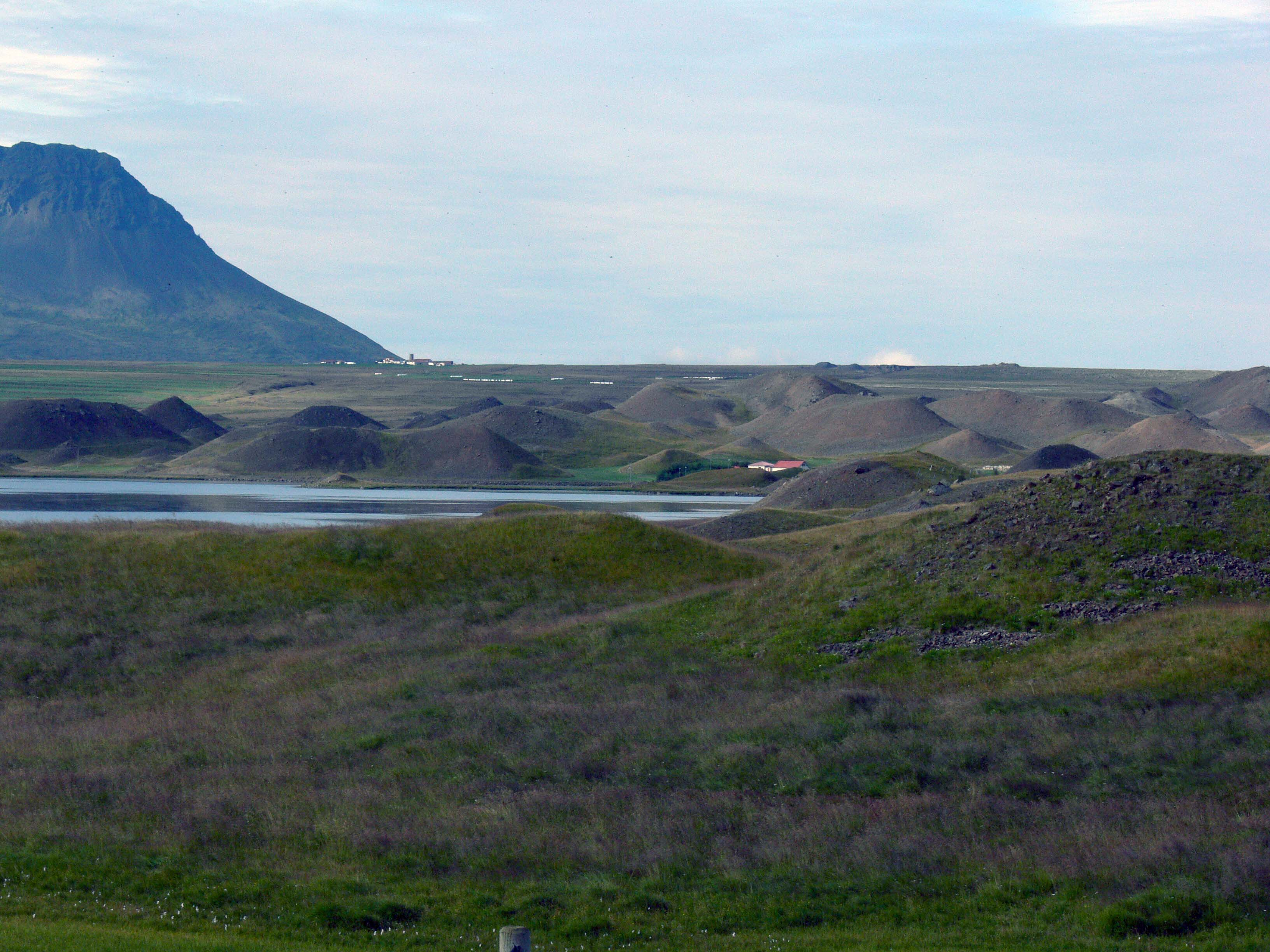 Vatnsdalur. Die Hügel in der Mitte stammen von katastrophalen Erdlawinen im 17. und 18. Jahrhundert. Sie stauten das Wasser des Flusses Vatnsdalsá auf und vernichteten so Weiden mancher ehemals reicher Bauernhöfe.